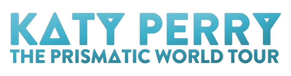 The Prismatic World Tour logo 2.0 by Maximunicorn.